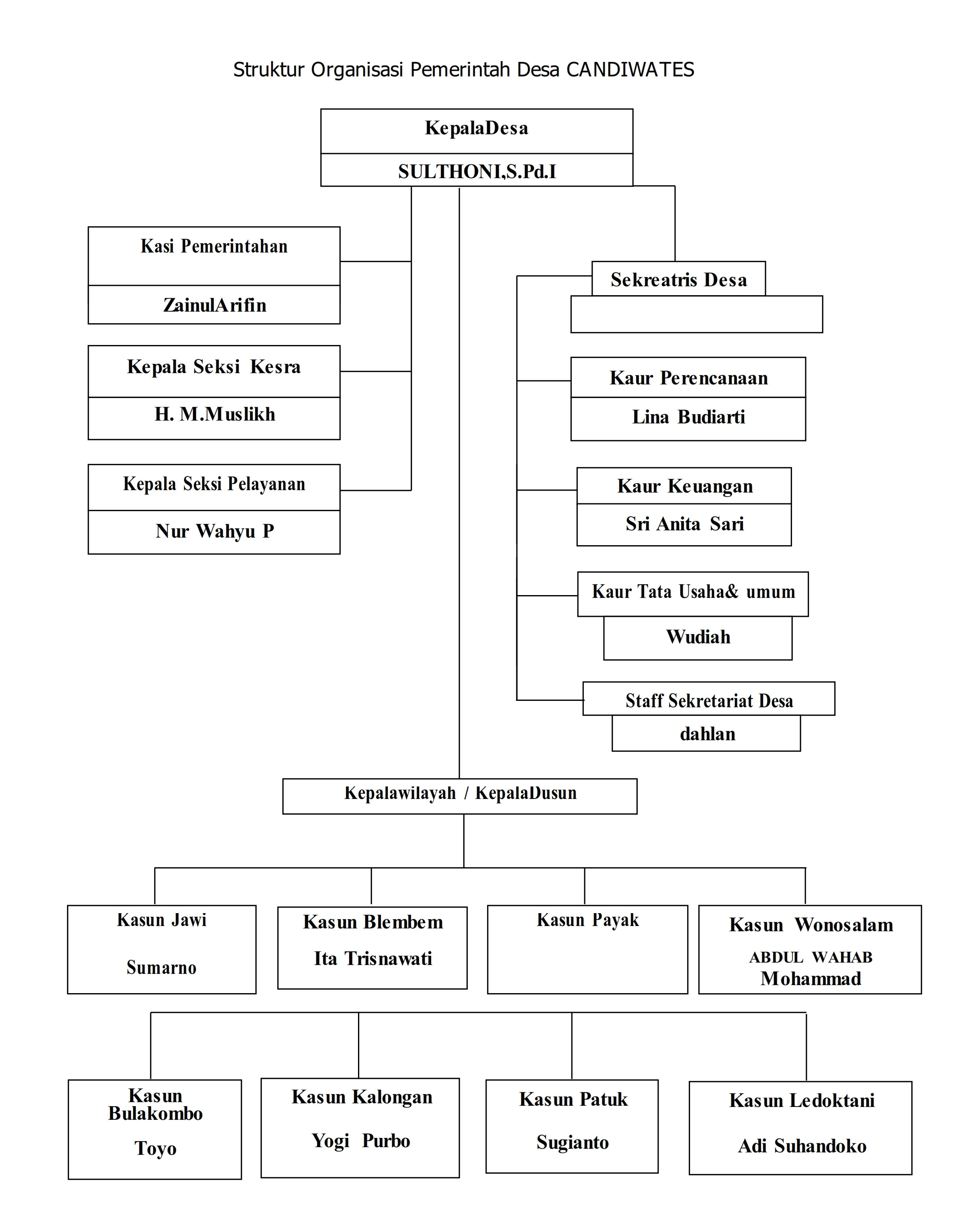 Struktur Organisasi Pemerintah Desa Candiwates Kecamatan Prigen